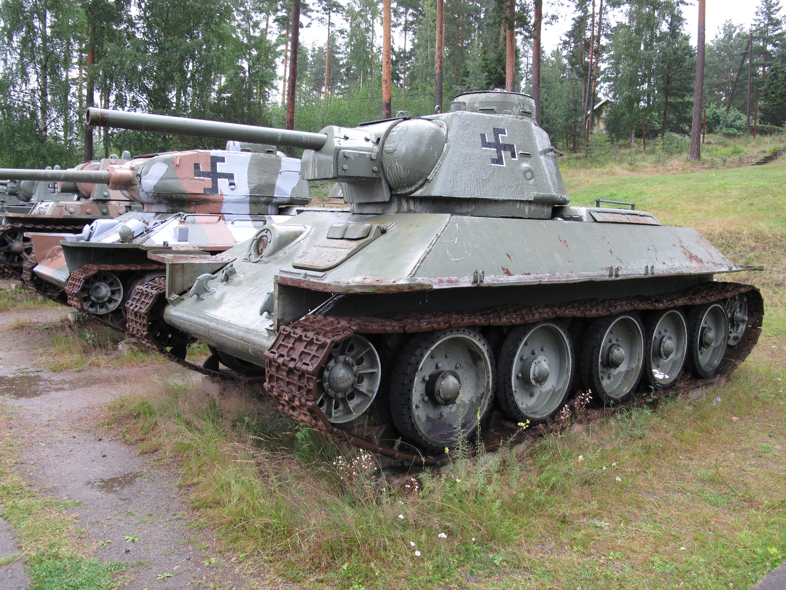 Танк Т-34 образца 1943 г. в музее в г. Парола (Финляндия)